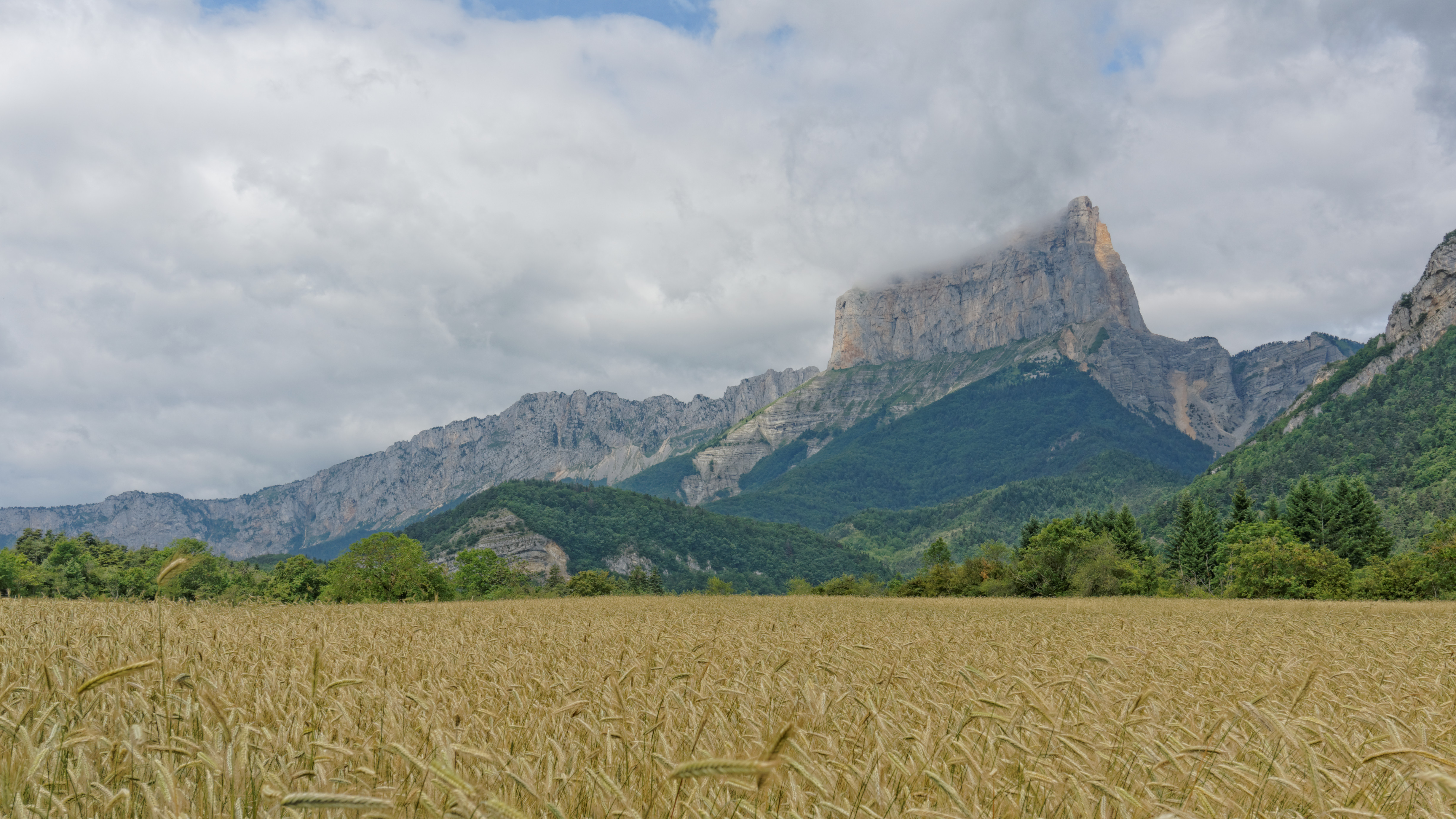 Le Mont Aiguille vu depuis Clelles